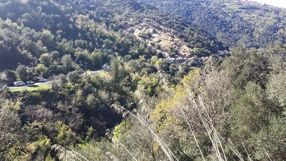 Tala Melulen recevant ses hôtes !